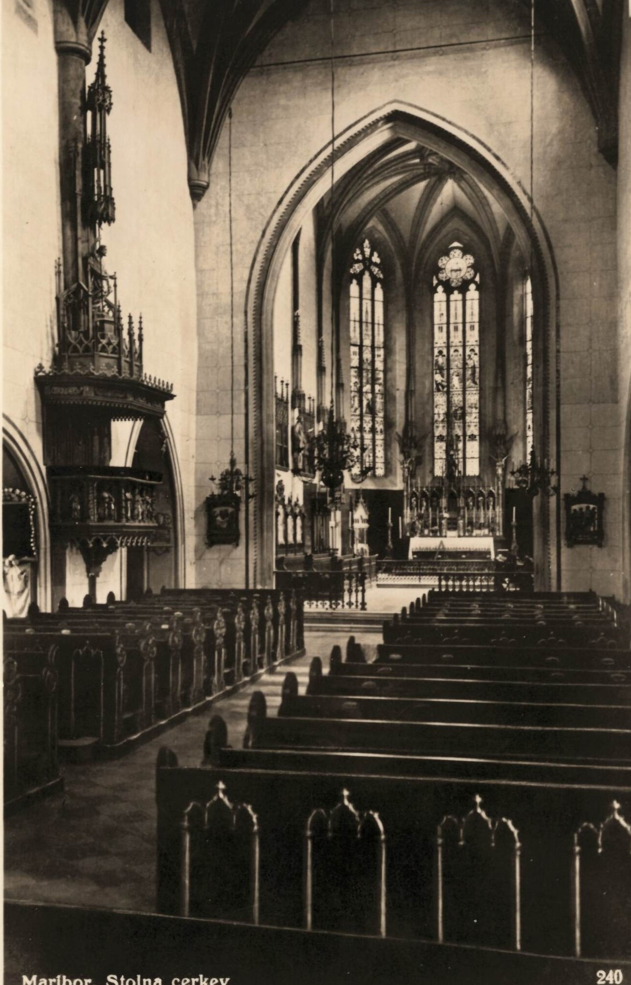 Stolna cerkev Maribor leta 1932 (Slikal Feliks Novak. Hrani UKM)